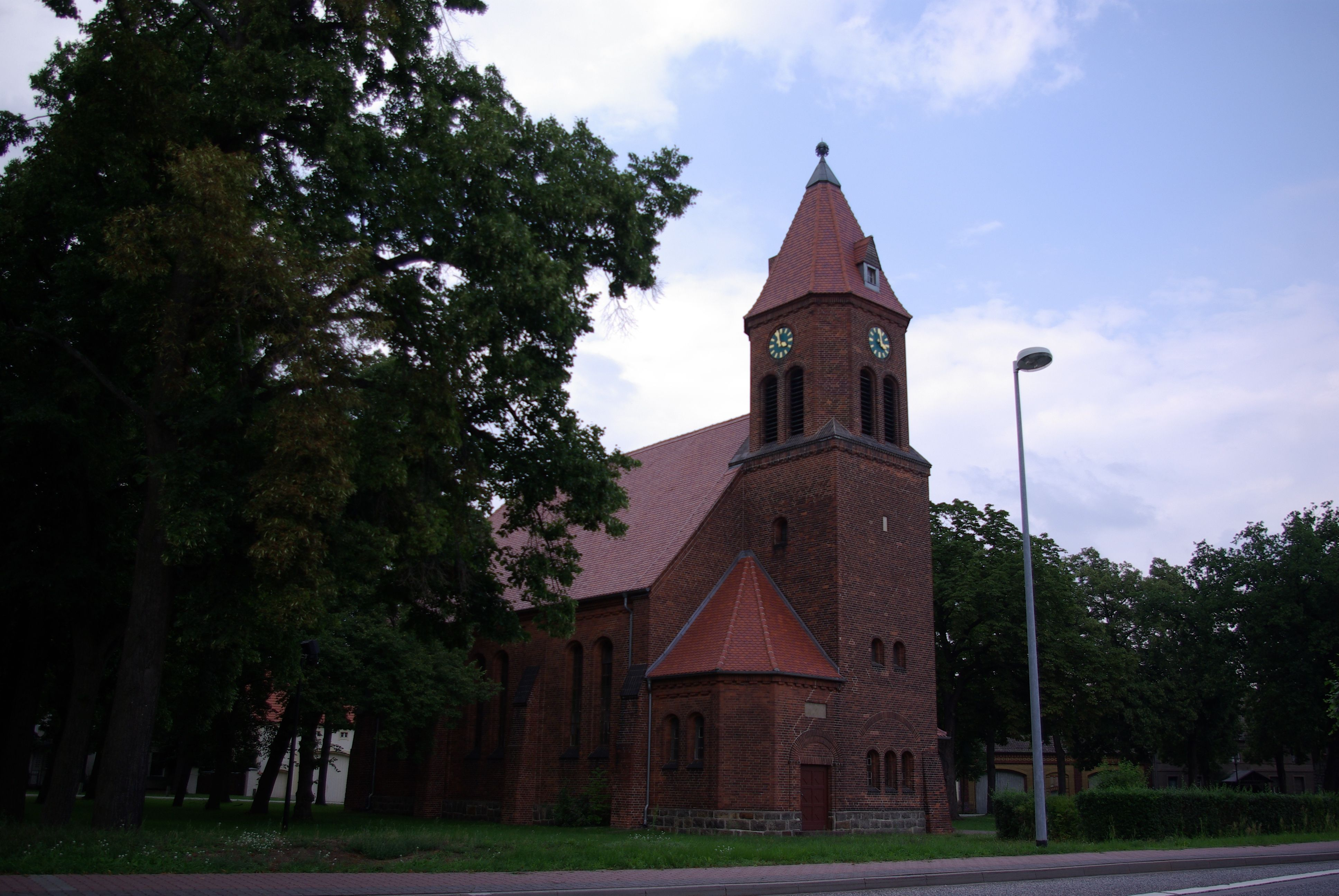 Nuthe-Urstromtal in Brandenburg. Die Kirche im Ortsteil Woltersdorf steht unter Denkmalschutz.